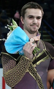 Ксения Столбова и Фёдор Климов с бронзовыми медалями чемпионата Европы по фигурному катанию 2012